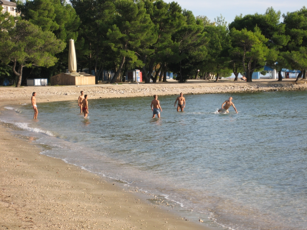 Igranje picigina, Crikvenica, Croatia, Saša,Mirjan,Damir,Dino,Ivica,Željko